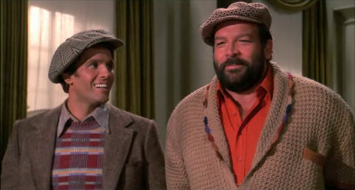 screenshot film Anche gli angeli mangiano fagioli